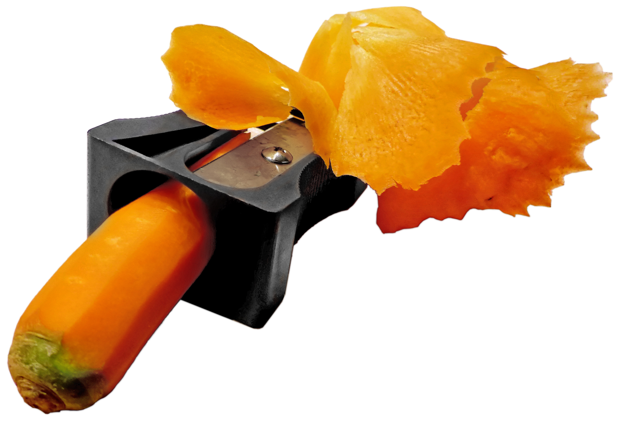 Karottenspitzer – Garnierhilfe und Küchenwerkzeug, zum „Spitzen“ bzw. Abschälen von „Karottenblumen“.